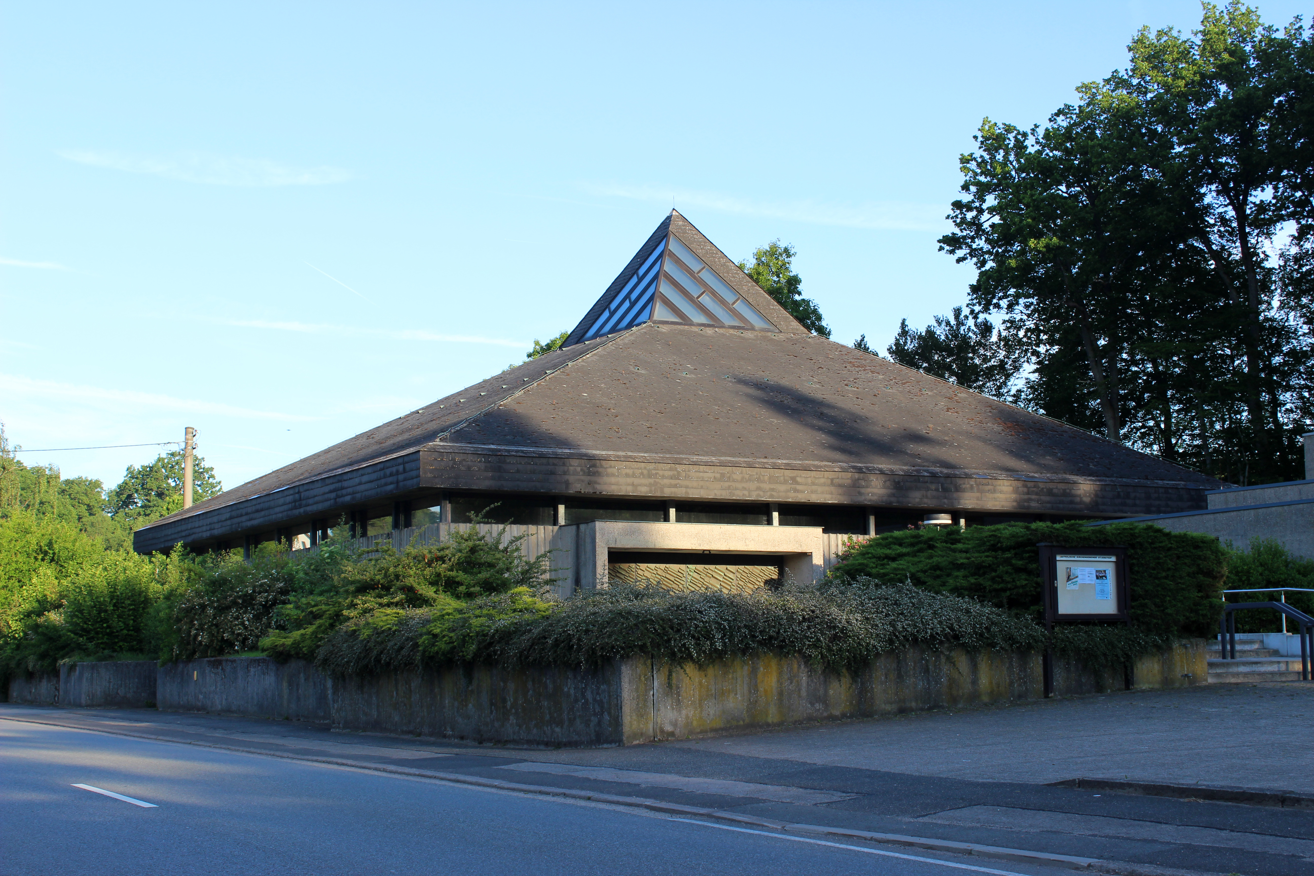 Katholische Kirche St. Ignatius in Nohfelden-Türkismühle, Saarland